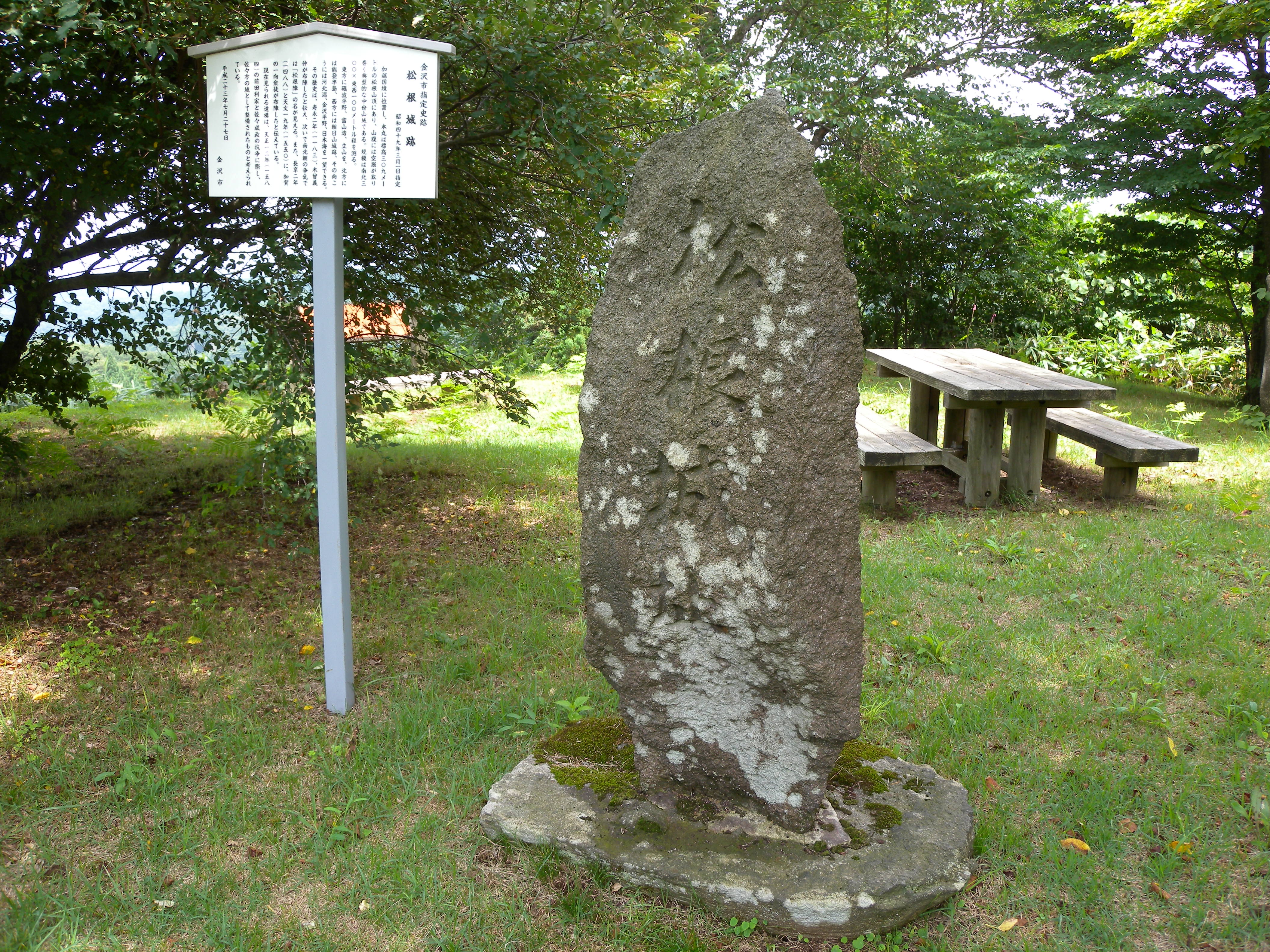 金沢市指定史跡の松根城址